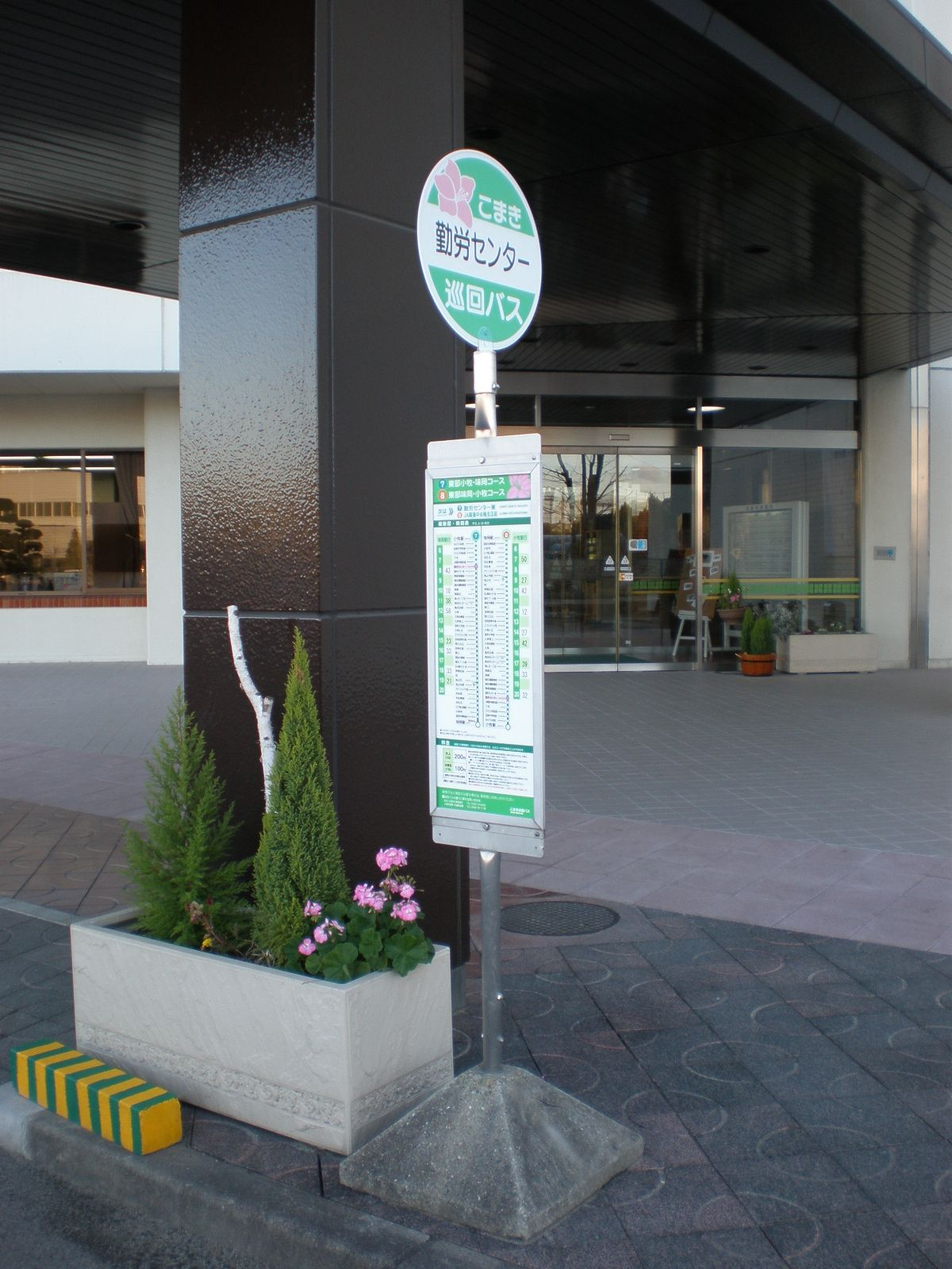 こまき巡回バスのバス停案内板（小牧勤労センター）